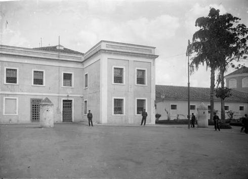 Pátio do Presídio Tiradentes antes da demolição, localizado na Avenida Tiradentes no bairro do Bom Retiro, São Paulo (SP), Brasil.